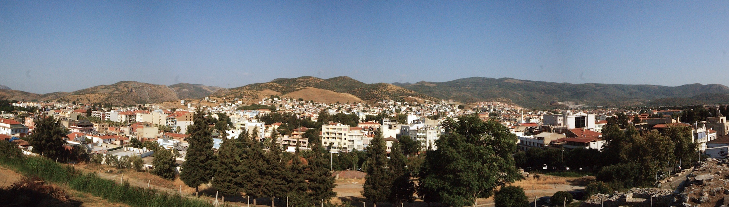 Selcuk seen from Ayasoluk